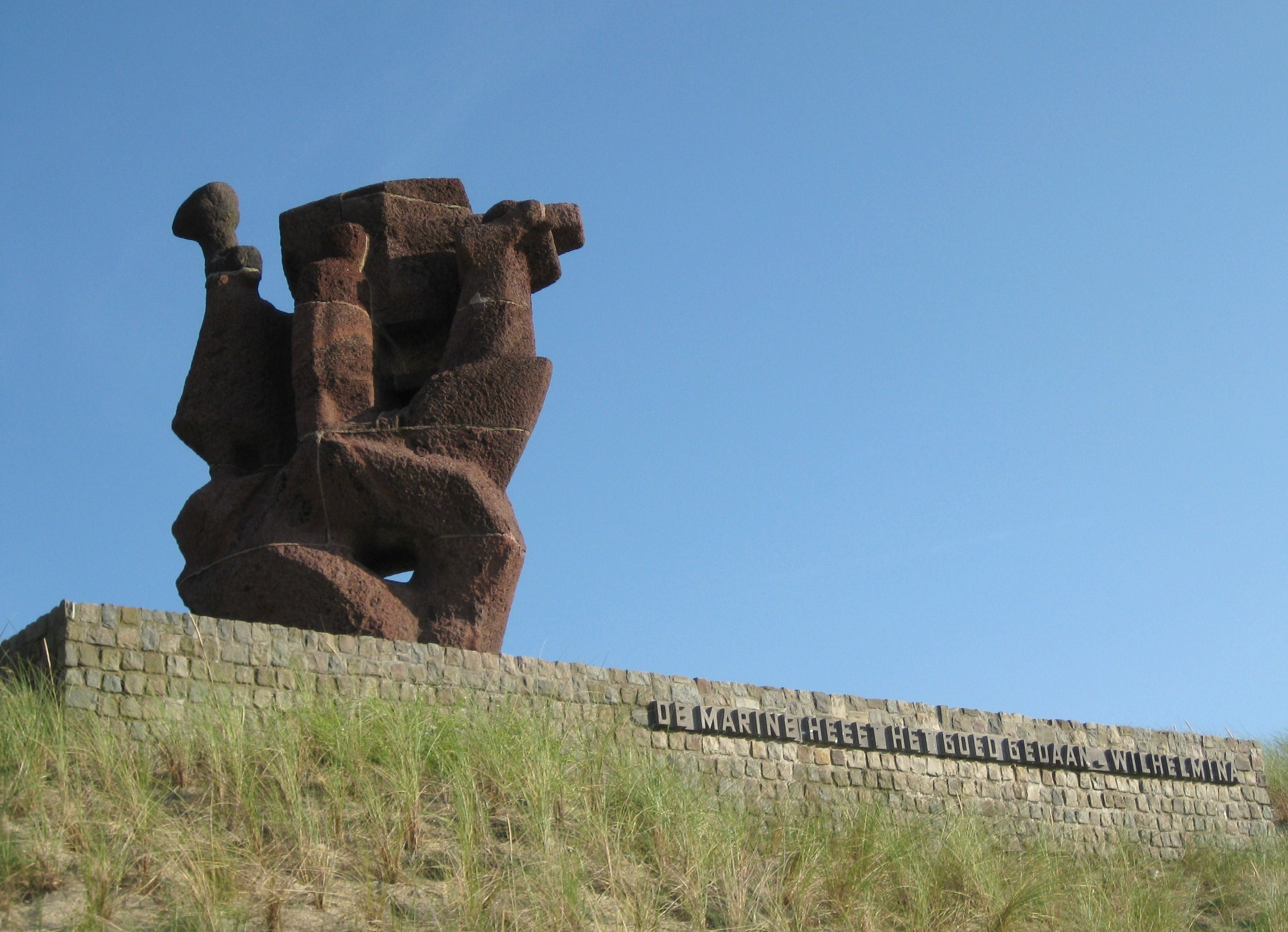 Nationaal Monument voor de Koninklijke Marine. Kunstenaar Mari S. Andriessen. 14 juni 1966 Zeekant, Scheveningen